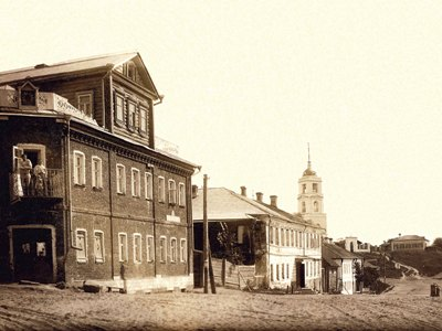 Zvenigorod. Savviskaya ulitsа (Savvinskaya street) 1896 Звенигород. Саввинская улица (ныне ул. Фрунзе). 1896